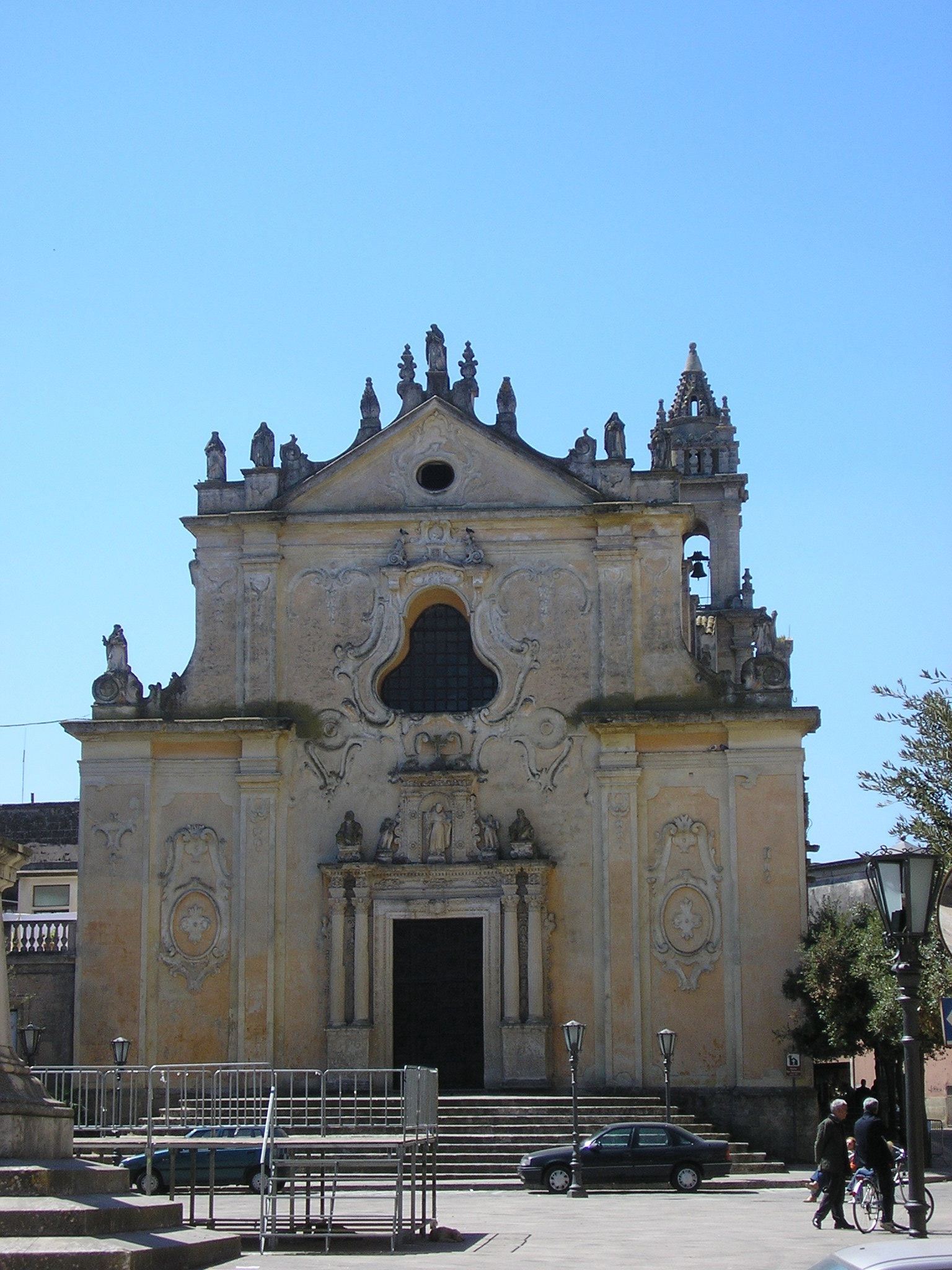 Dominikanerkirche.